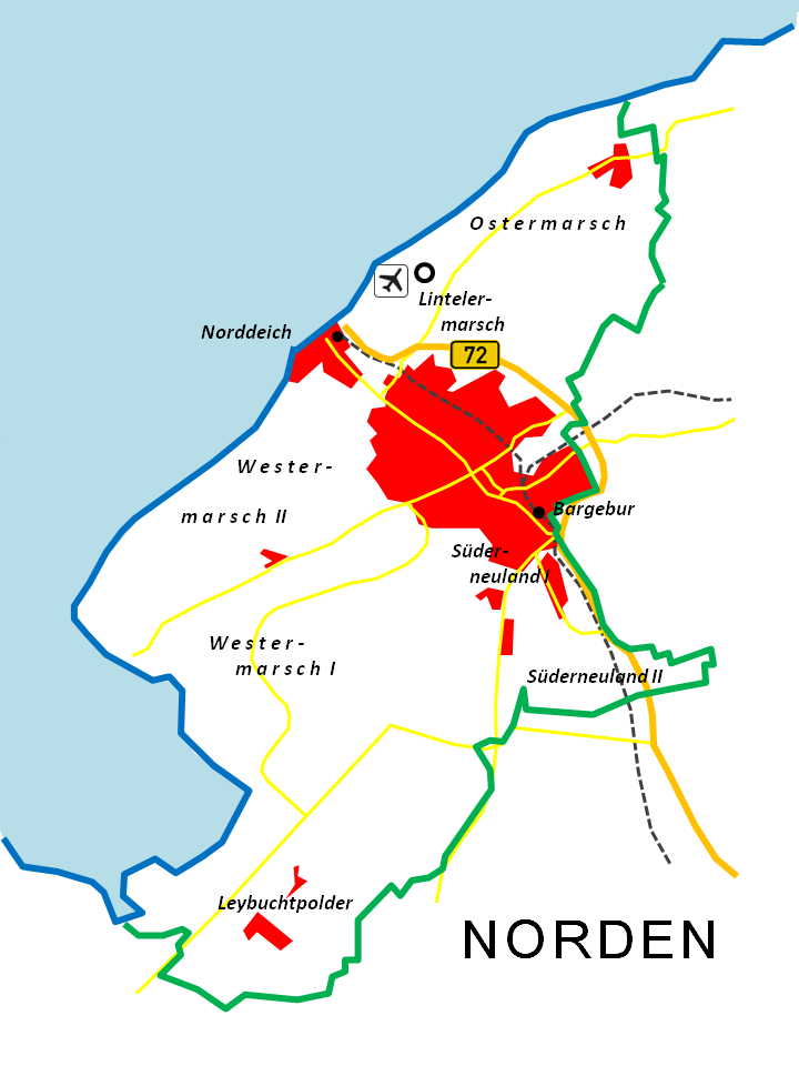 Verkehrsnetzkarte - Stadt Norden, Niedersachsen, Deutschland